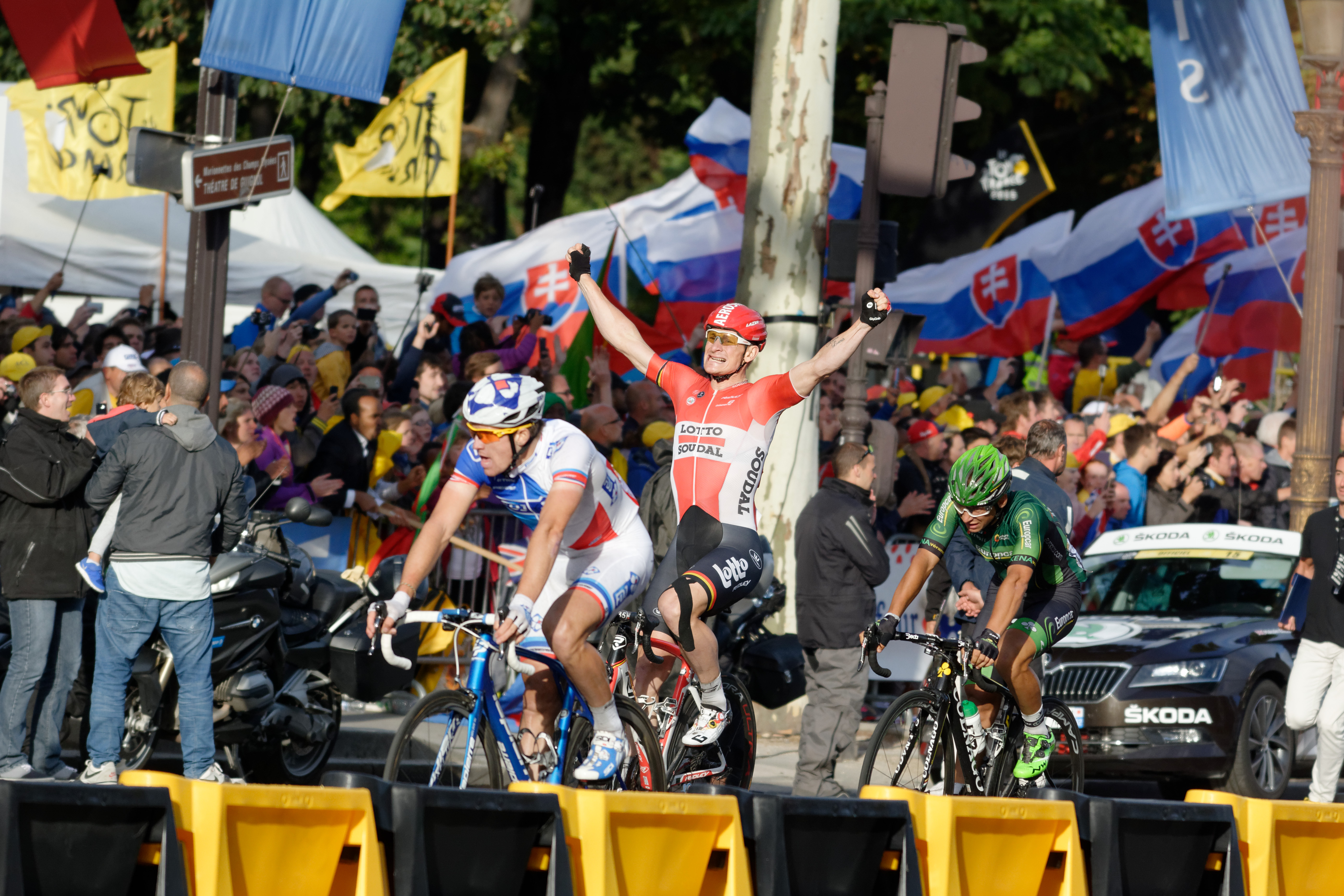 D71_3368_DxO